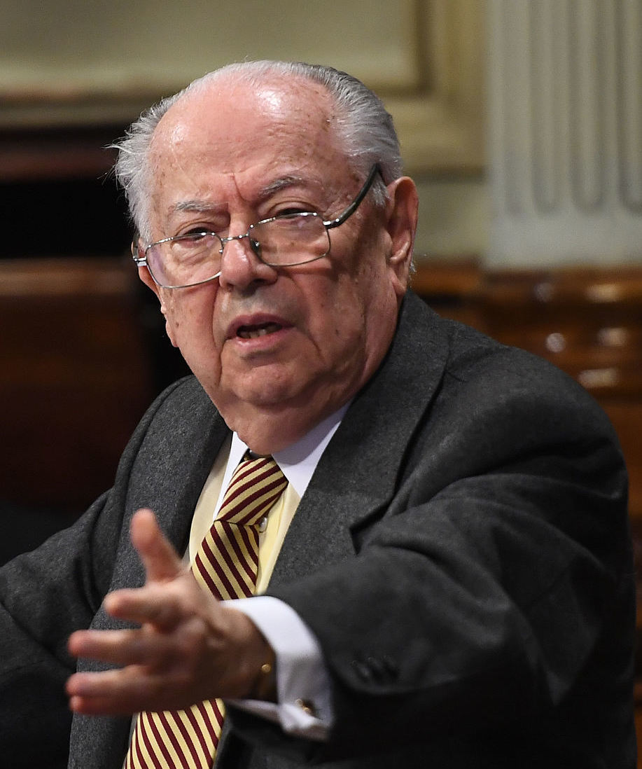 Prestación del libro Discursos Parlamentarios en el Senado y en la Convención Constituyente de 1994 de Eduardo Menem.